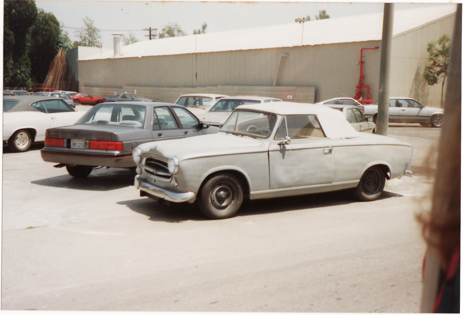 Lieutenant Colombo's Peugeot 403 Cabriolet at Universal Studios, Los Angeles